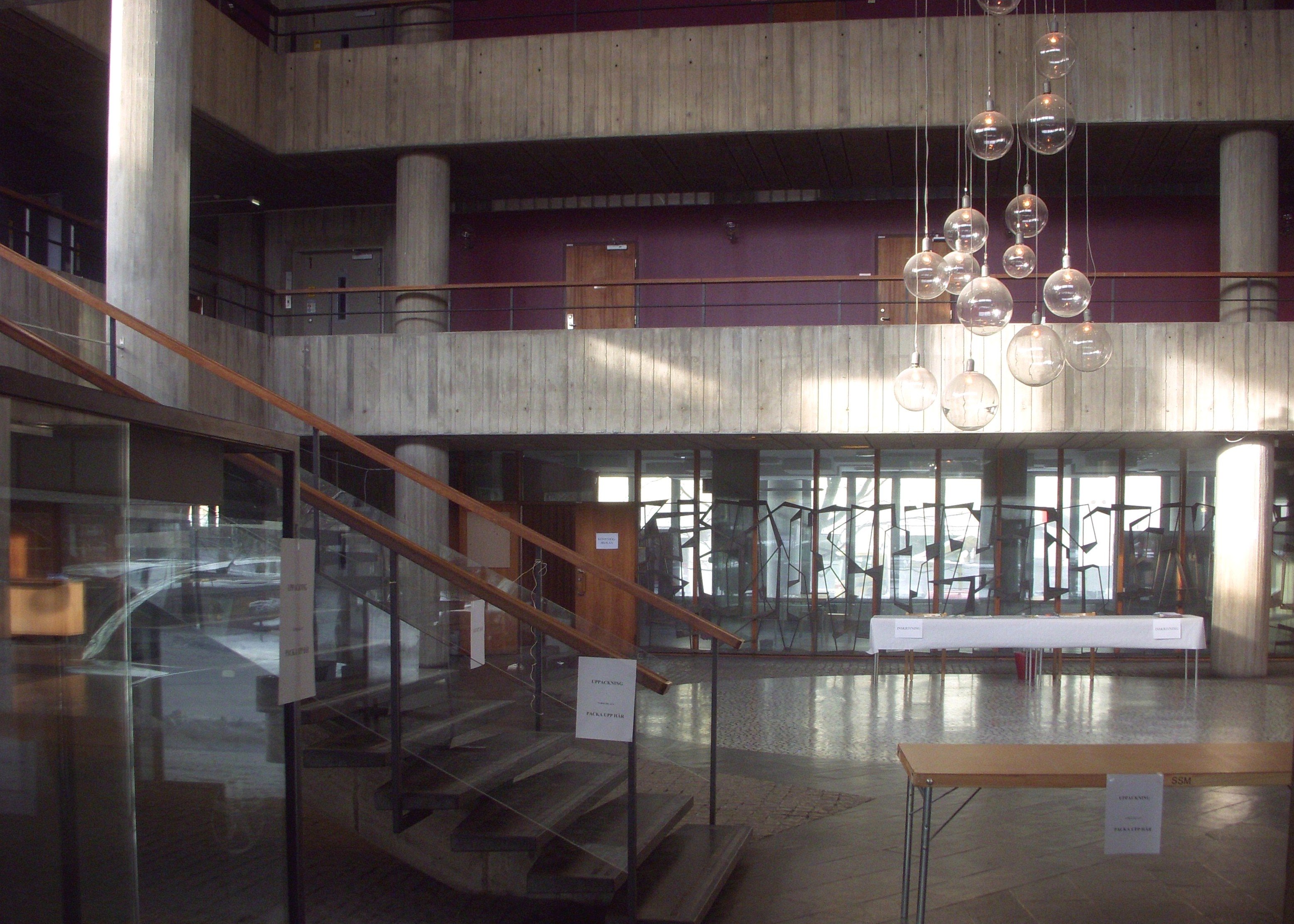 S:t Görans Gymnasium, Stockholm, arkitekt Léonie Geisendorf